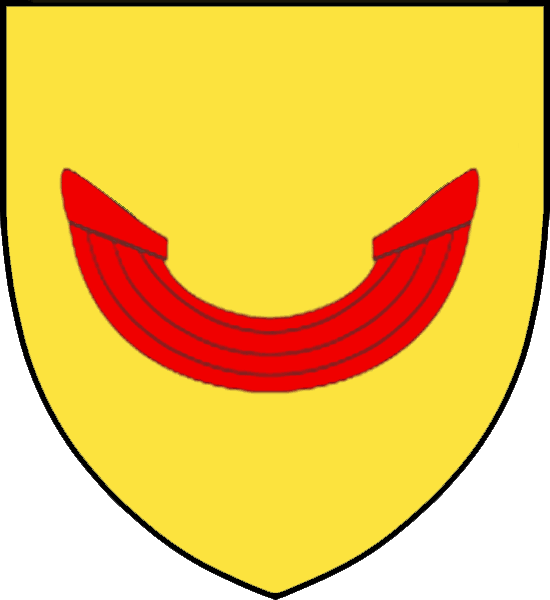 Vapensköld för adelsätten Bååt